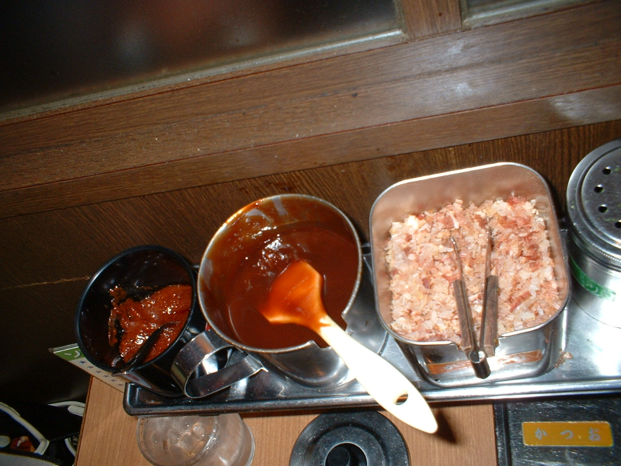 Okonomiyaki's seasoning (お好み焼きの調味料)